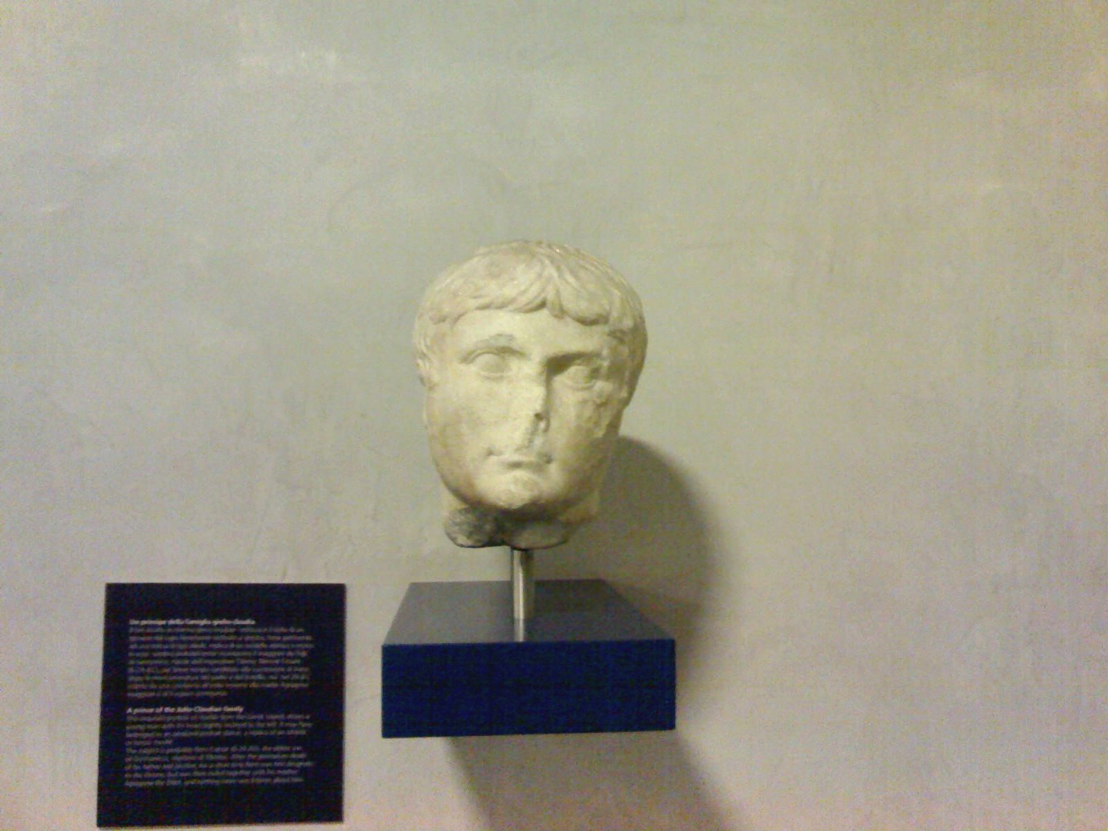 Alcuni reperti del Museo Stazione Neapolis di Napoli. Si tratta della testa marmorea del principe Germanico rinvenuta in piazza Nicola Amore.